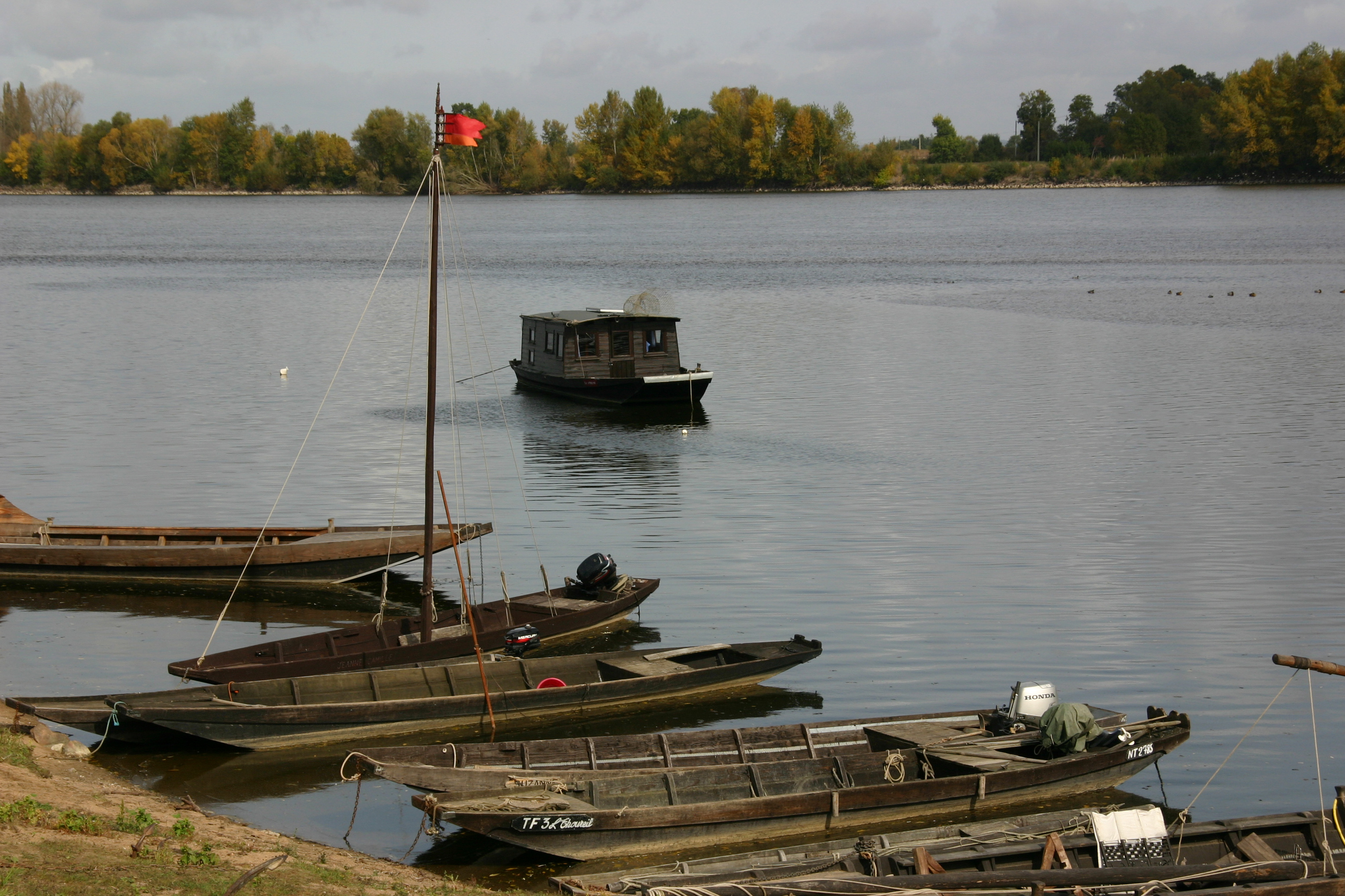 Loire bei Le Thoureil